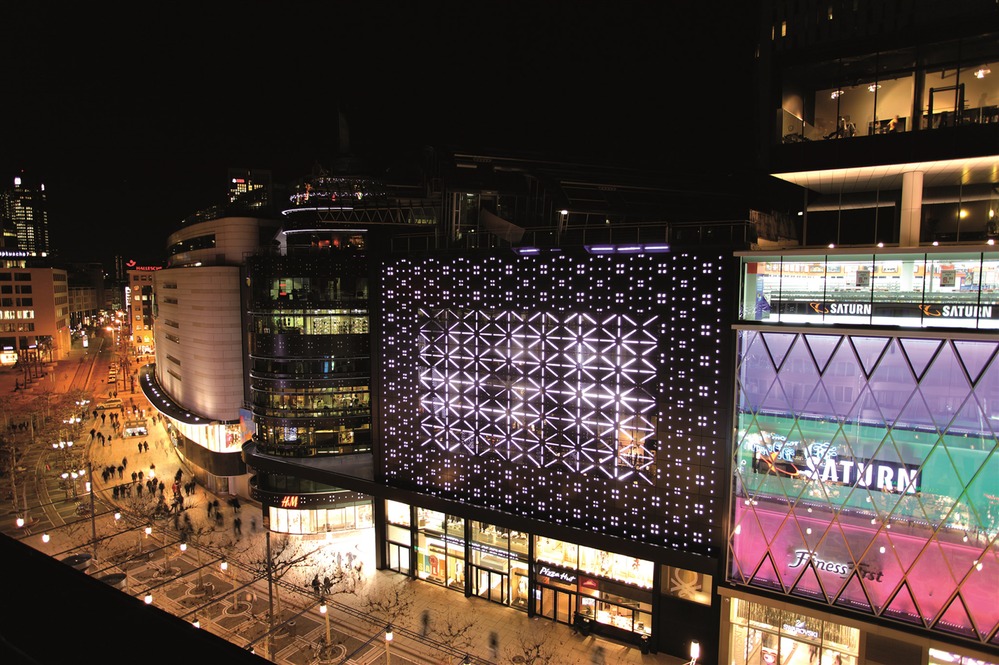 Ein 260 Quadratmeter großer Medienscreen, der mit rund 14.000 Leuchtdioden ausgestattet ist.